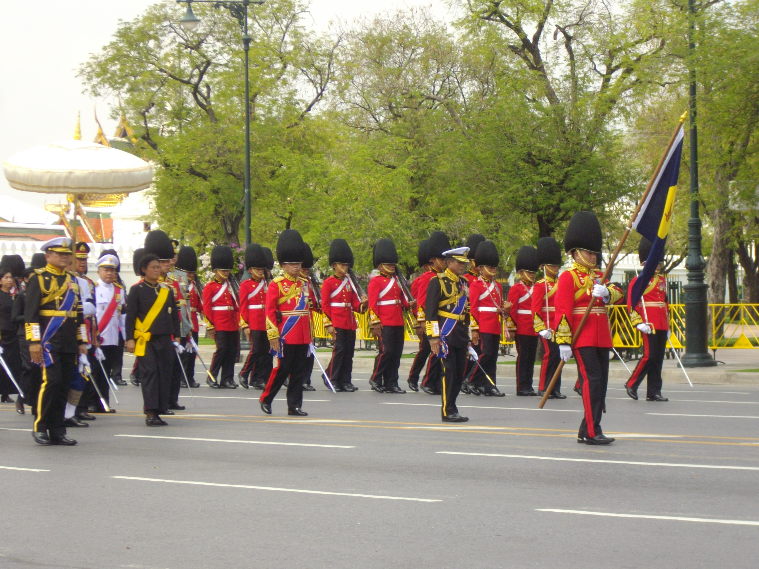 สมเด็จพระเทพรัตนราชสุดา เจ้าฟ้ามหาจักรีสิรินธร สยามบรมราชกุมารี เสด็จพระราชดำเนินตามพระมหาพิชัยราชรถ ทรงพระศพ สมเด็จพระเจ้าภคินีเธอ เจ้าฟ้าเพชรรัตนราชสุดา สิริโสภาพัณณวดี ในริ้วกระบวนพระอิสสริยยศ อัญเชิญพระศพ ด้วยพระมหาพิชัยราชรถ จากหน้าวัดพระเชตุพนวิมลมังคลาราม ไปยังพระเมรุท้องสนามหลวง วันที่ 9 เมษายน พ.ศ. 2555